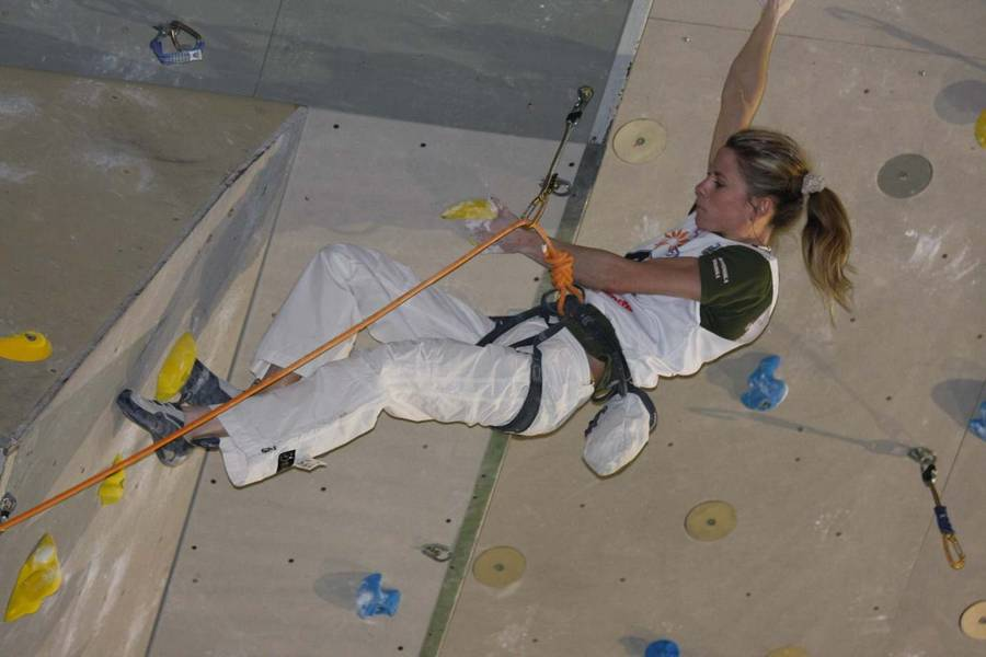 Maja Vidmar.